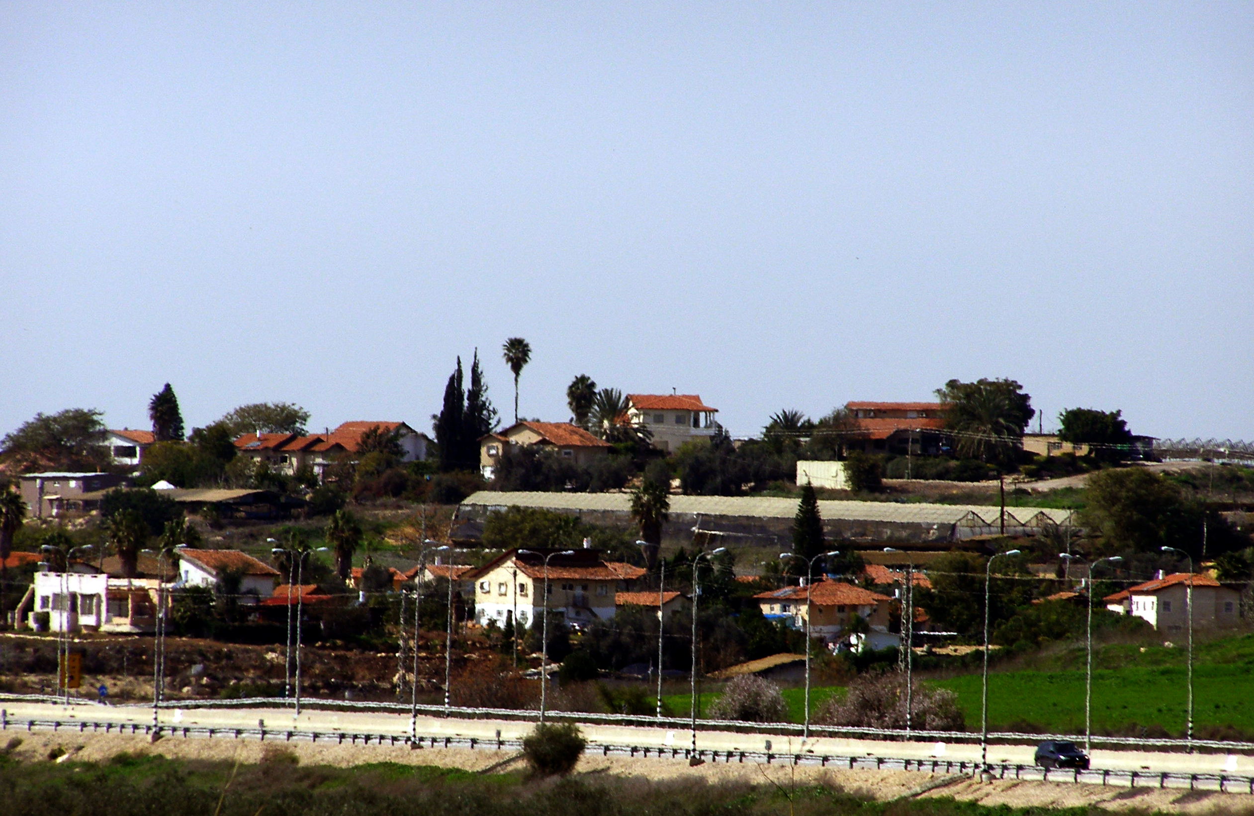 Moshav Baqoa